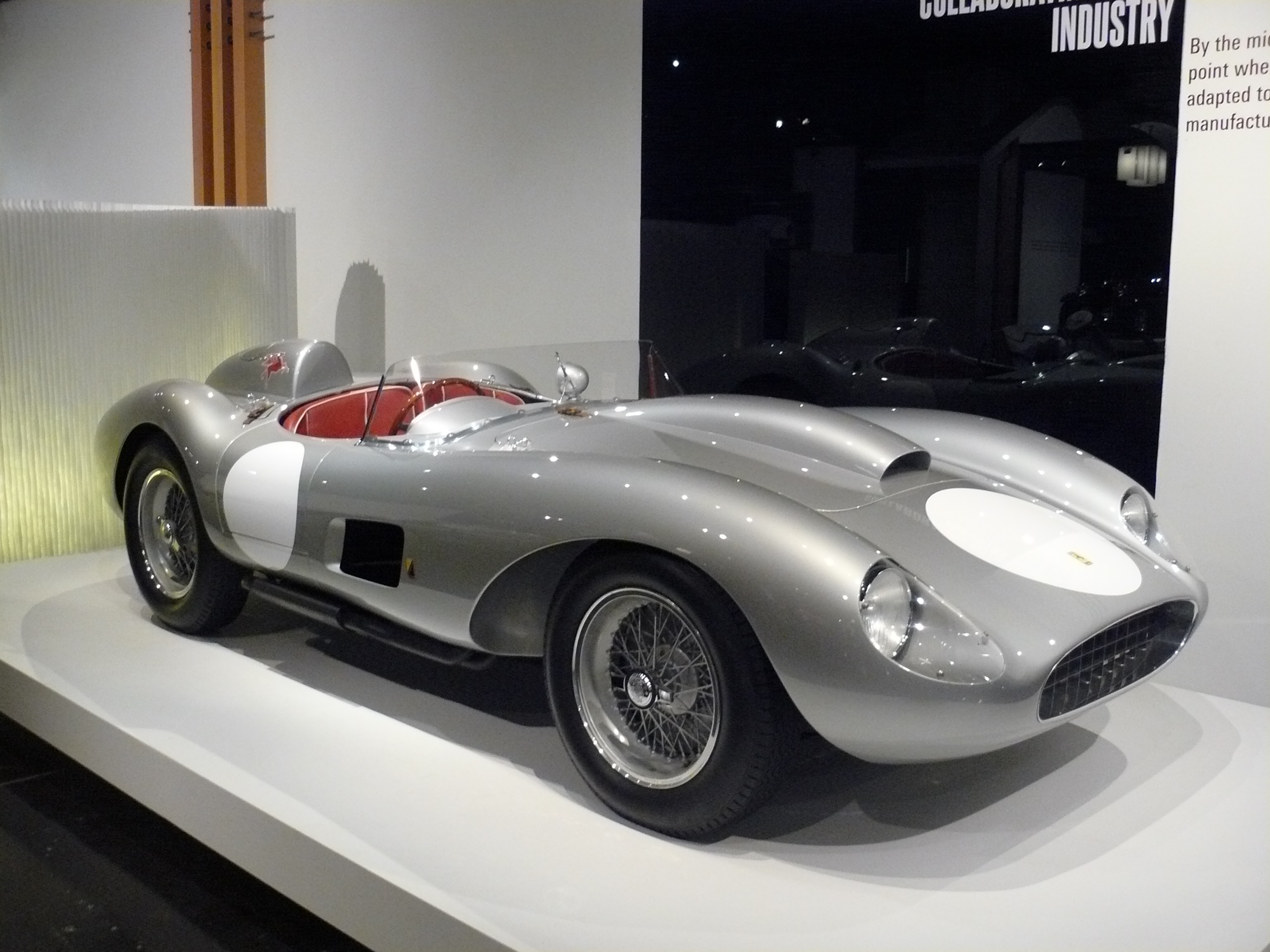 Musée Petersen 2012.